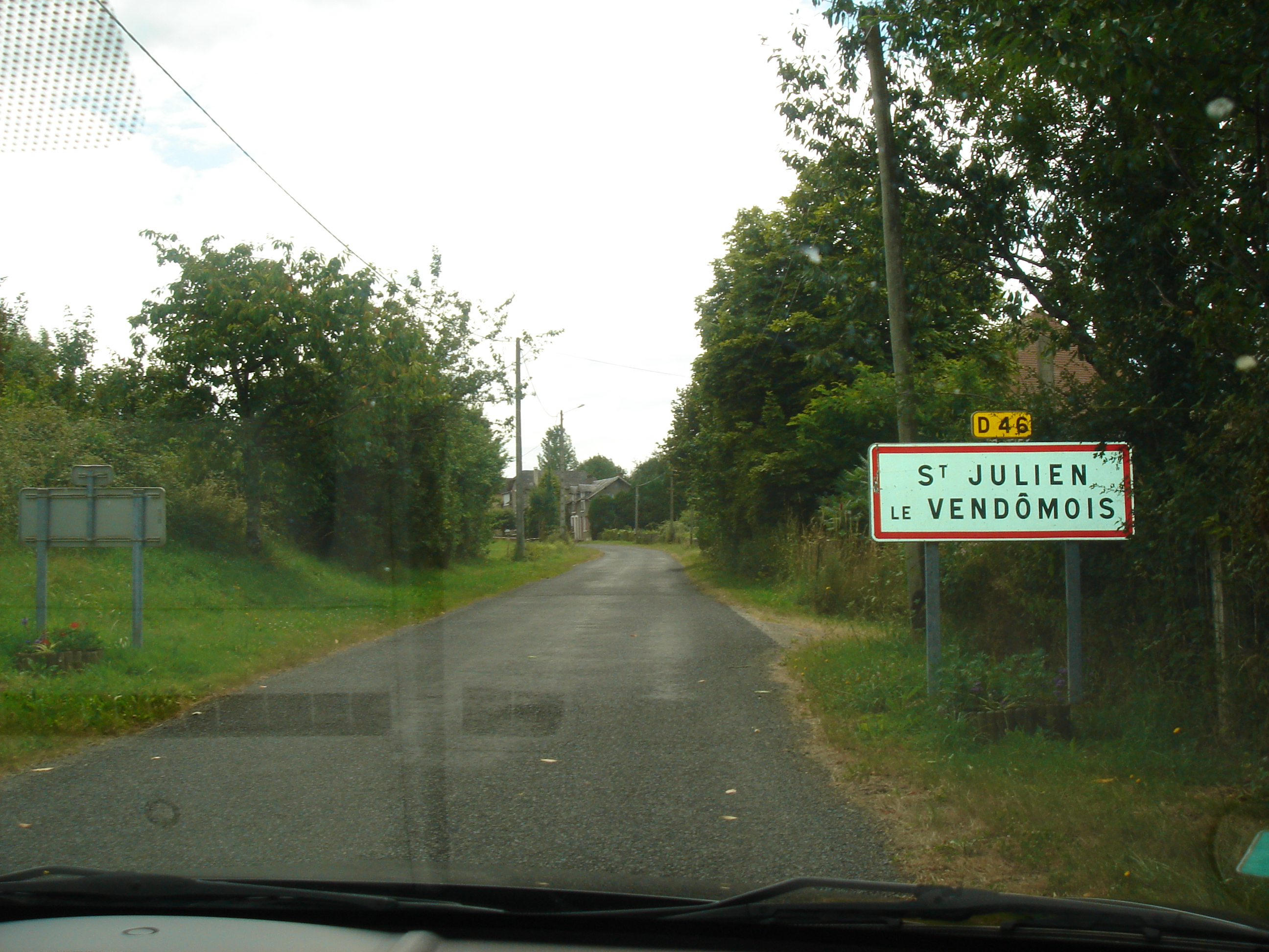 entrée du village de st julien le vendômois